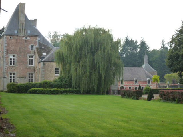 Château XVIe siècle, d'Orjo de Marchovelette, Fosses-la-Ville (Sart-Eustache), Belgique.